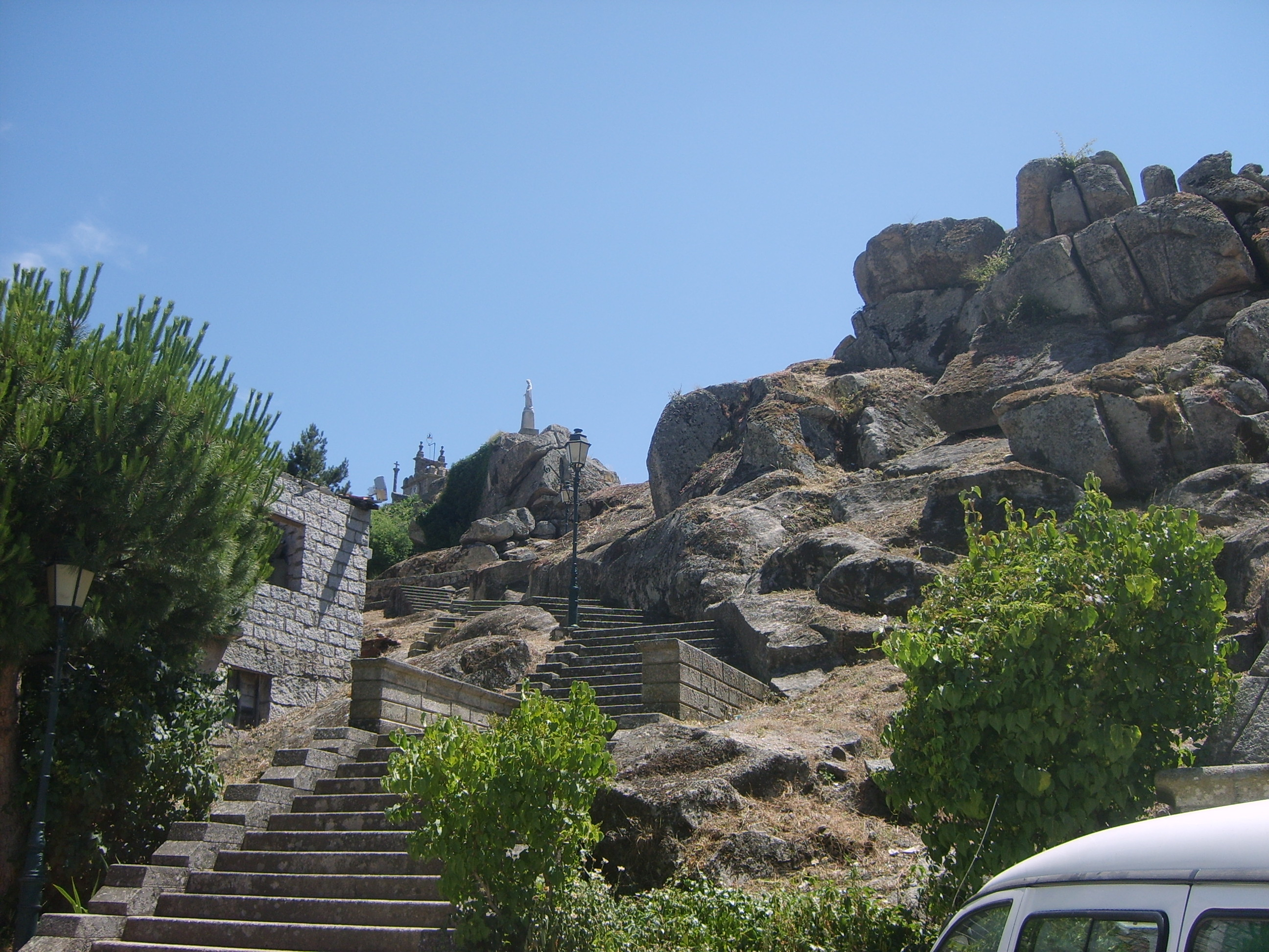 construction_da_Mêda